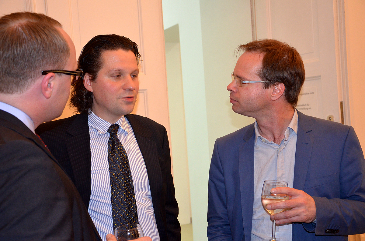 Im Gespräch (von links): Nils Wiegrefe, Alptekin Kirci (SPD) aus dem Verbindungsbüro zur Landesbeauftragten für Migration und Teilhabe in der Niedersächsischen Staatskanzlei, sowie René Zechlin, Direktor vom Kunstverein Hannover ...